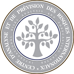 Centre d'analyse et de prévision des risques internationaux (CAPRI)